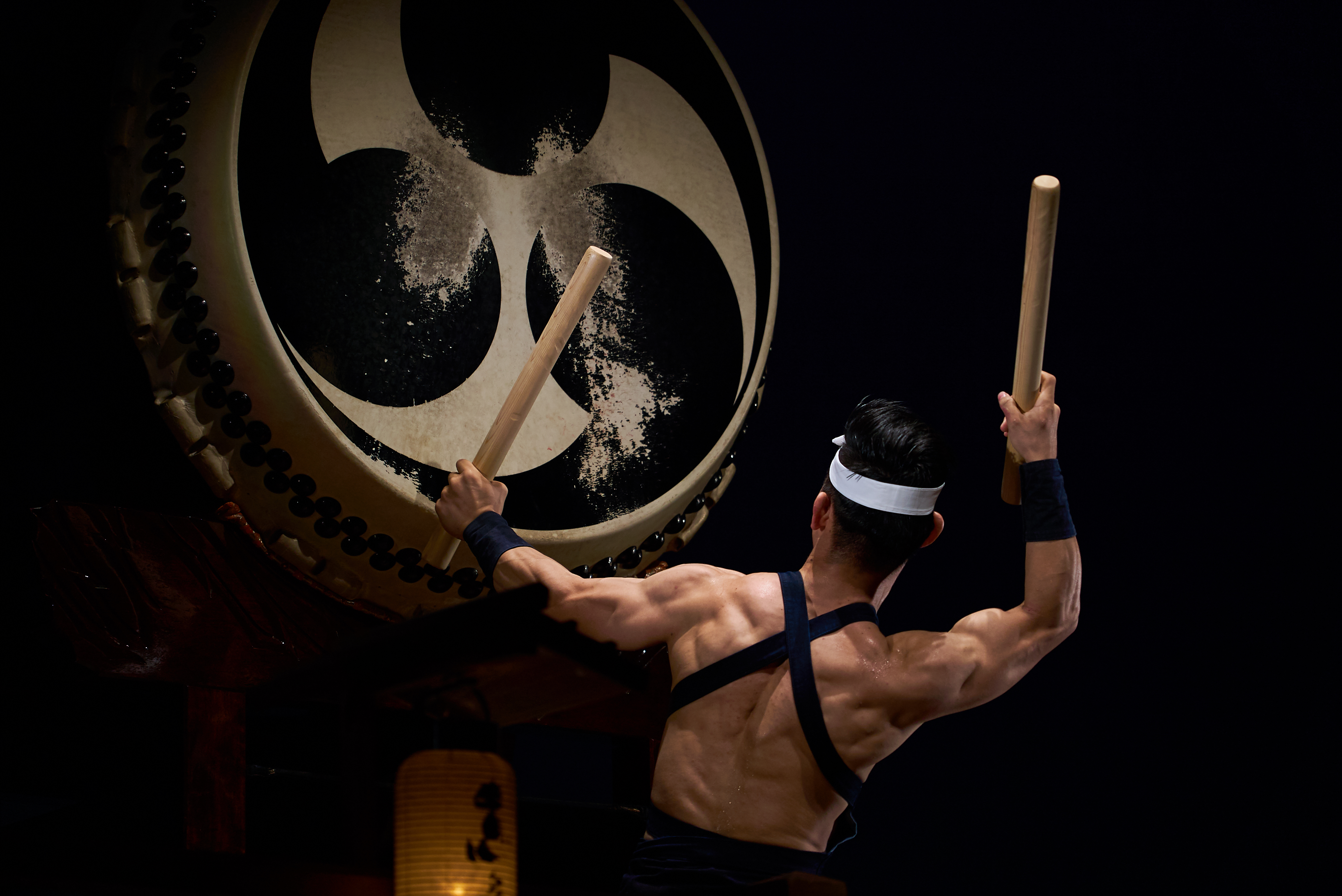 大太鼓 志多らの公演にて